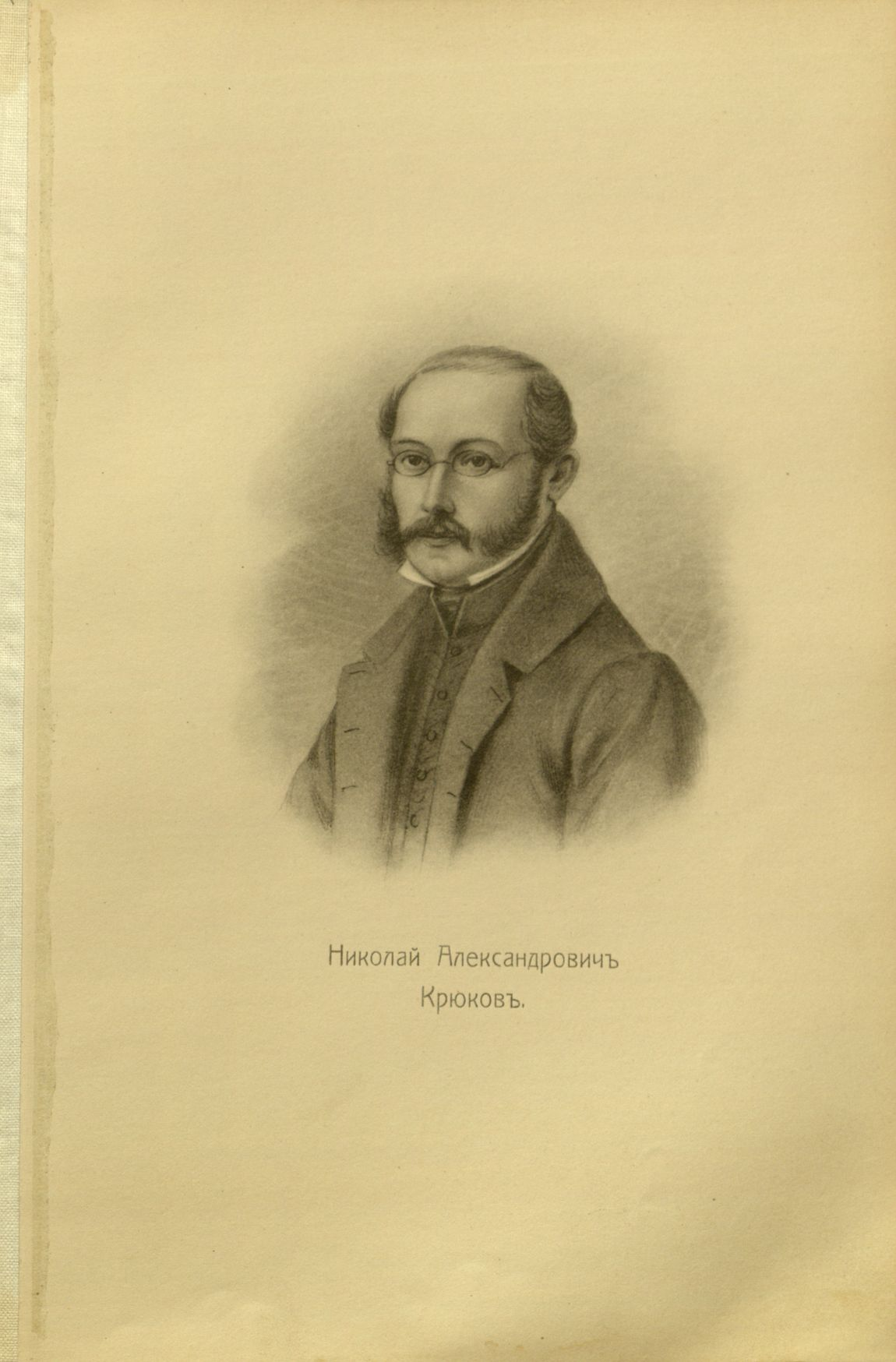 Головачев, П. М. Декабристы : 86 портретов, вид Петровского завода и 2 бытовых рисунка того времени. - М., [1906] Крюков, Николай Александрович